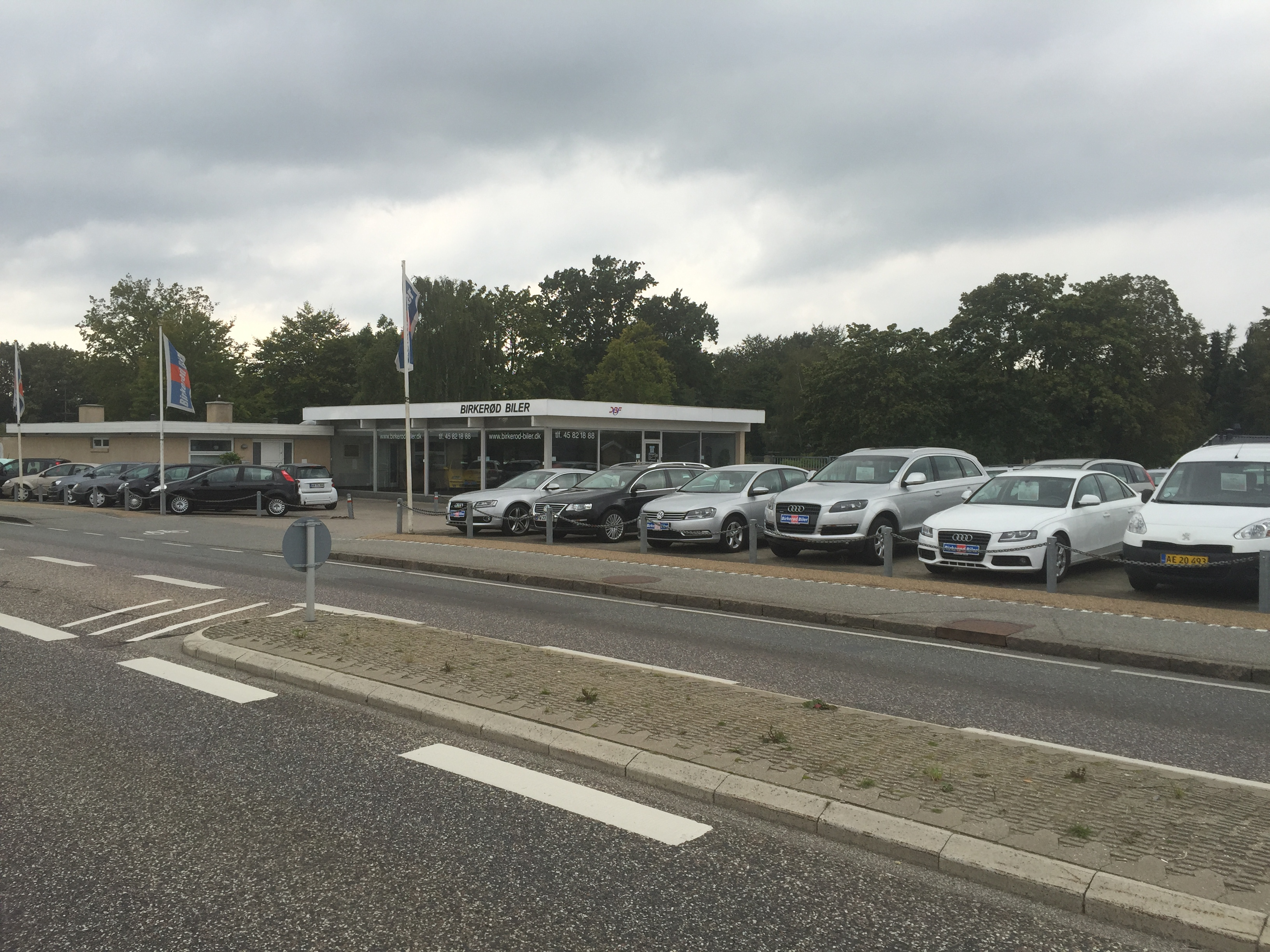 Brugtbilforhandler Birkerød Biler, Birkerød